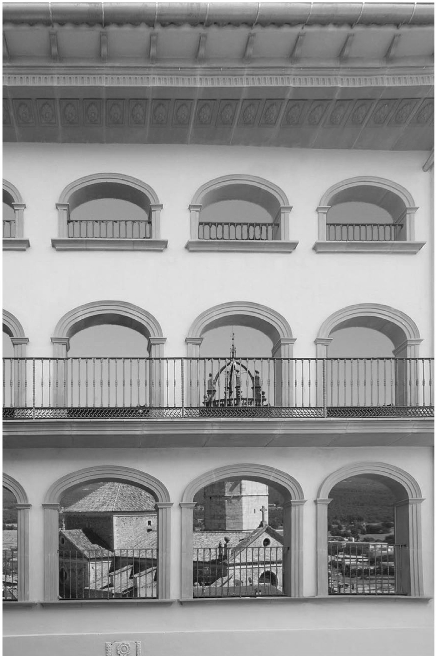 Casa de les joies situada al carrer de les joies Nº 33 al costat de l'Ajuntament.